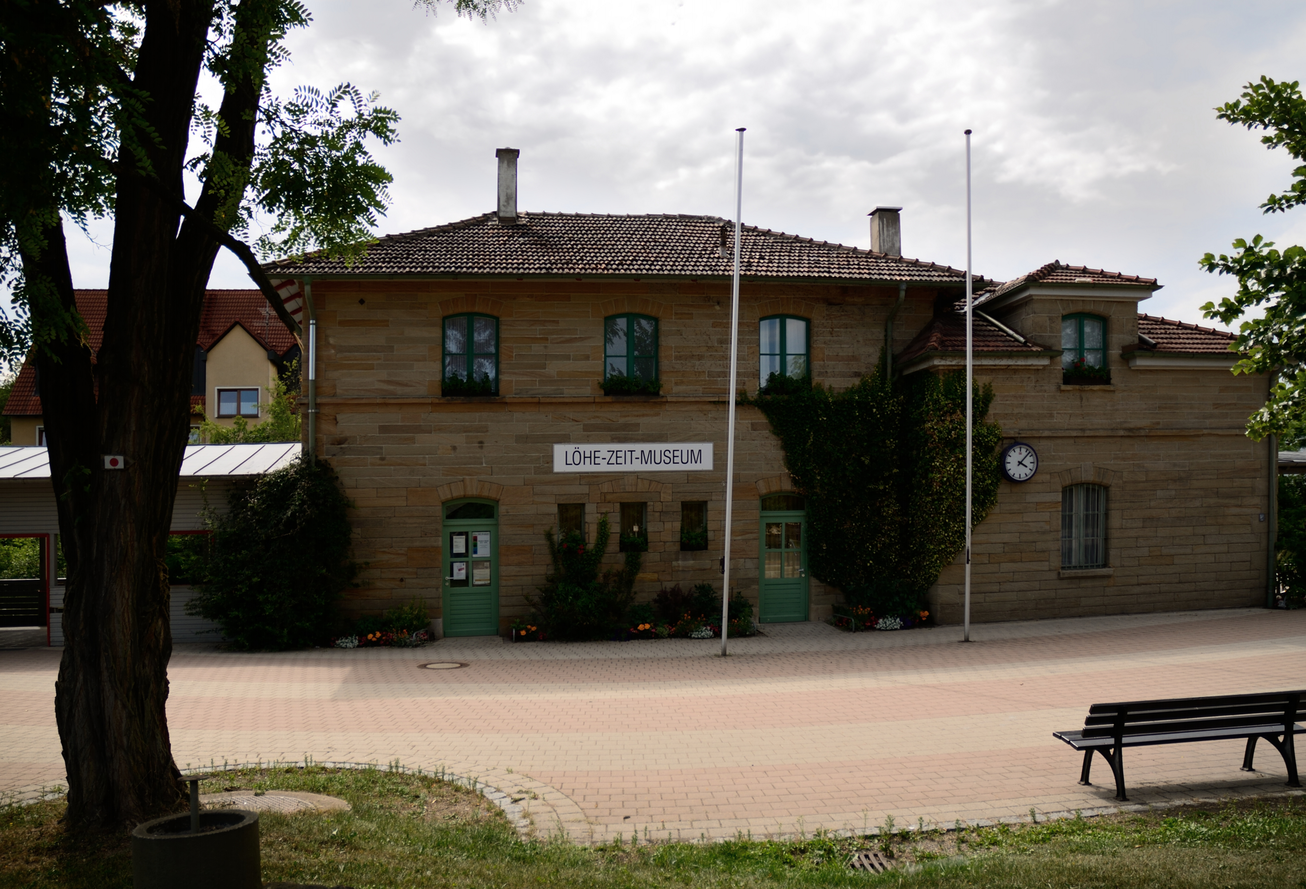 Bahnhof Neuendettelsau, zugleich auch Löhe-Zeit-Museum